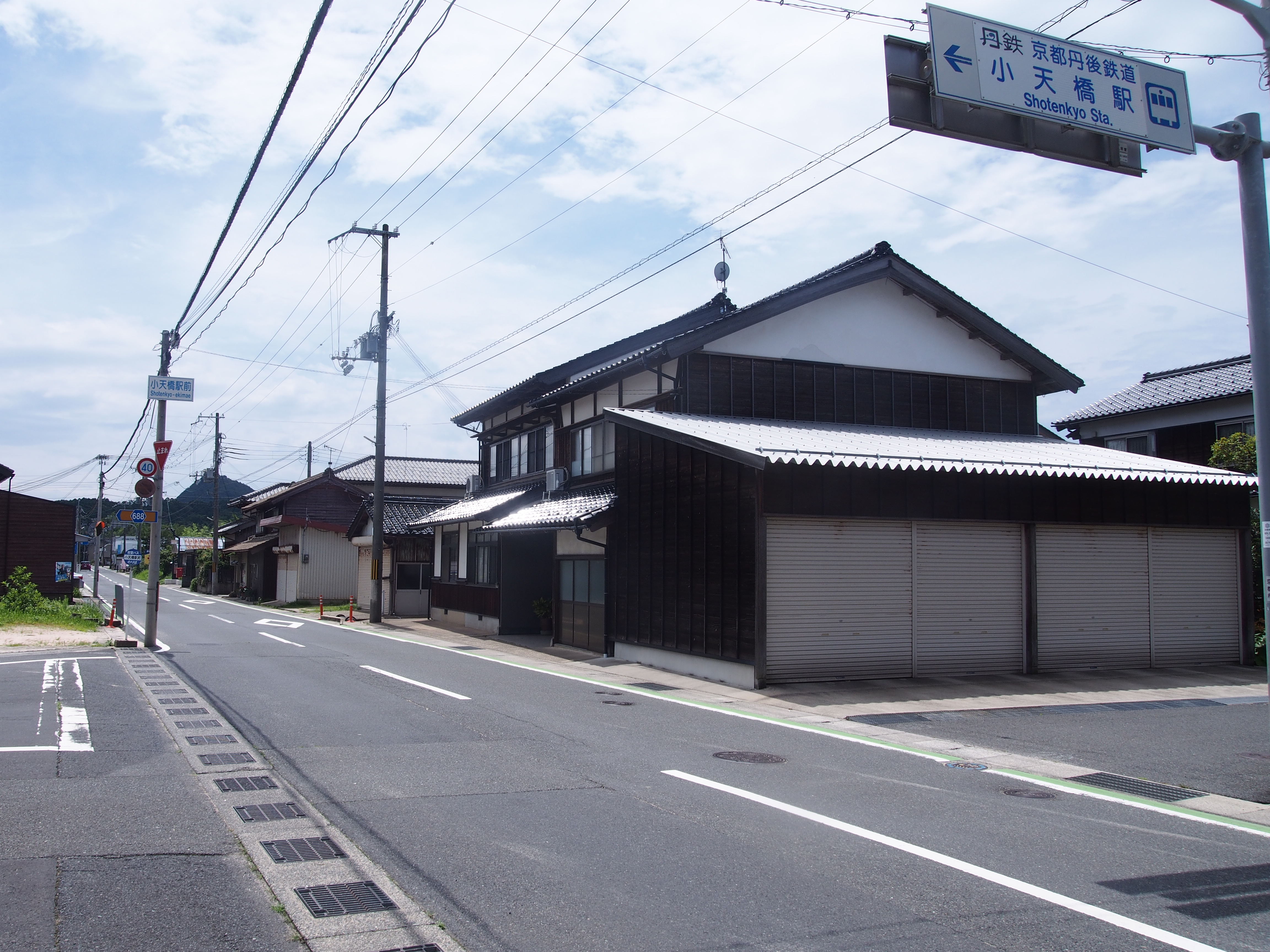 小天橋駅（京都丹後鉄道宮豊線）京都府京丹後市久美浜町浦明 駅前の様子。府道49号線